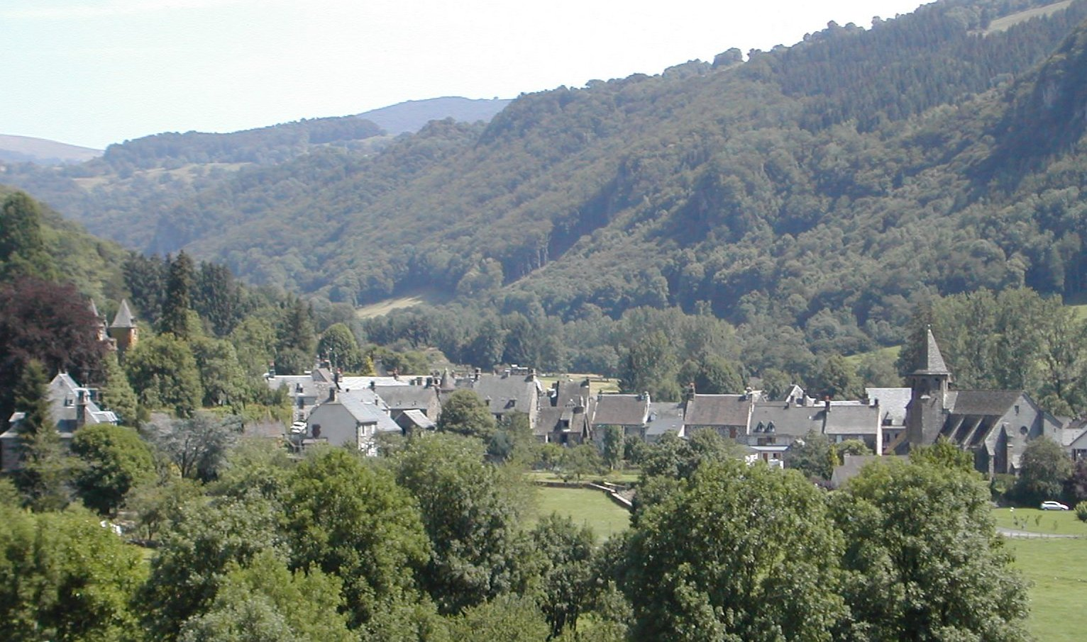 Le village de Fontanges, vue générale (Cantal, France)